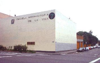 Escuela Nacional Preparatoria 7, UNAM.